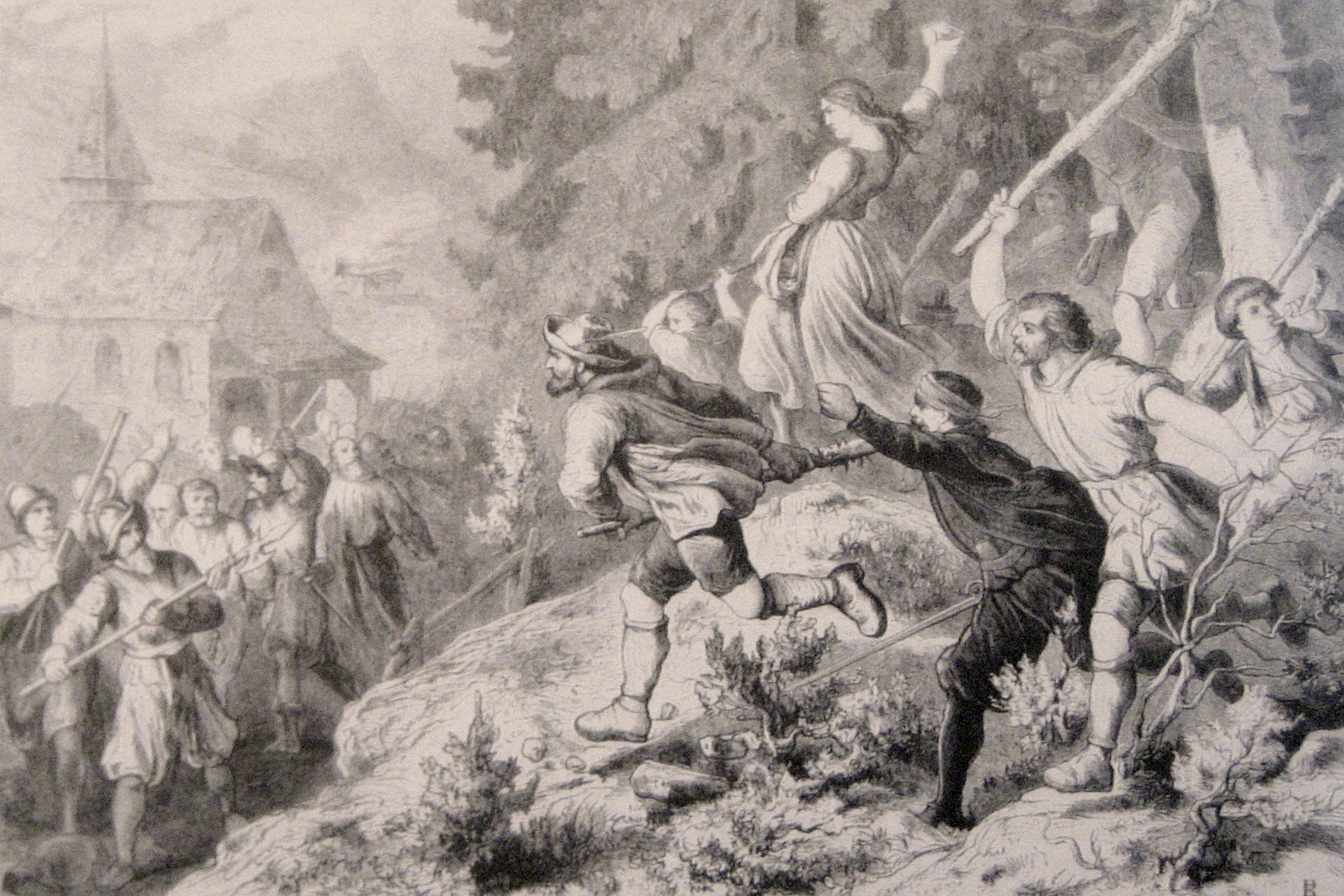 «Keulen der Verzweiflung» Zeichnung von Gottlieb Emil Rittmeyer (1820-1904) zum Prättigauer Aufstand; in Holz geschnitten von Buri&Jeker in: Schweizergeschichte in Bildern, Bern 1871